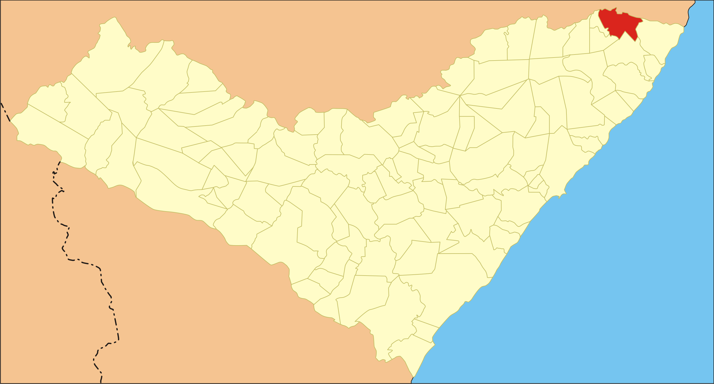 Localização da cidade no estado de Alagoas.